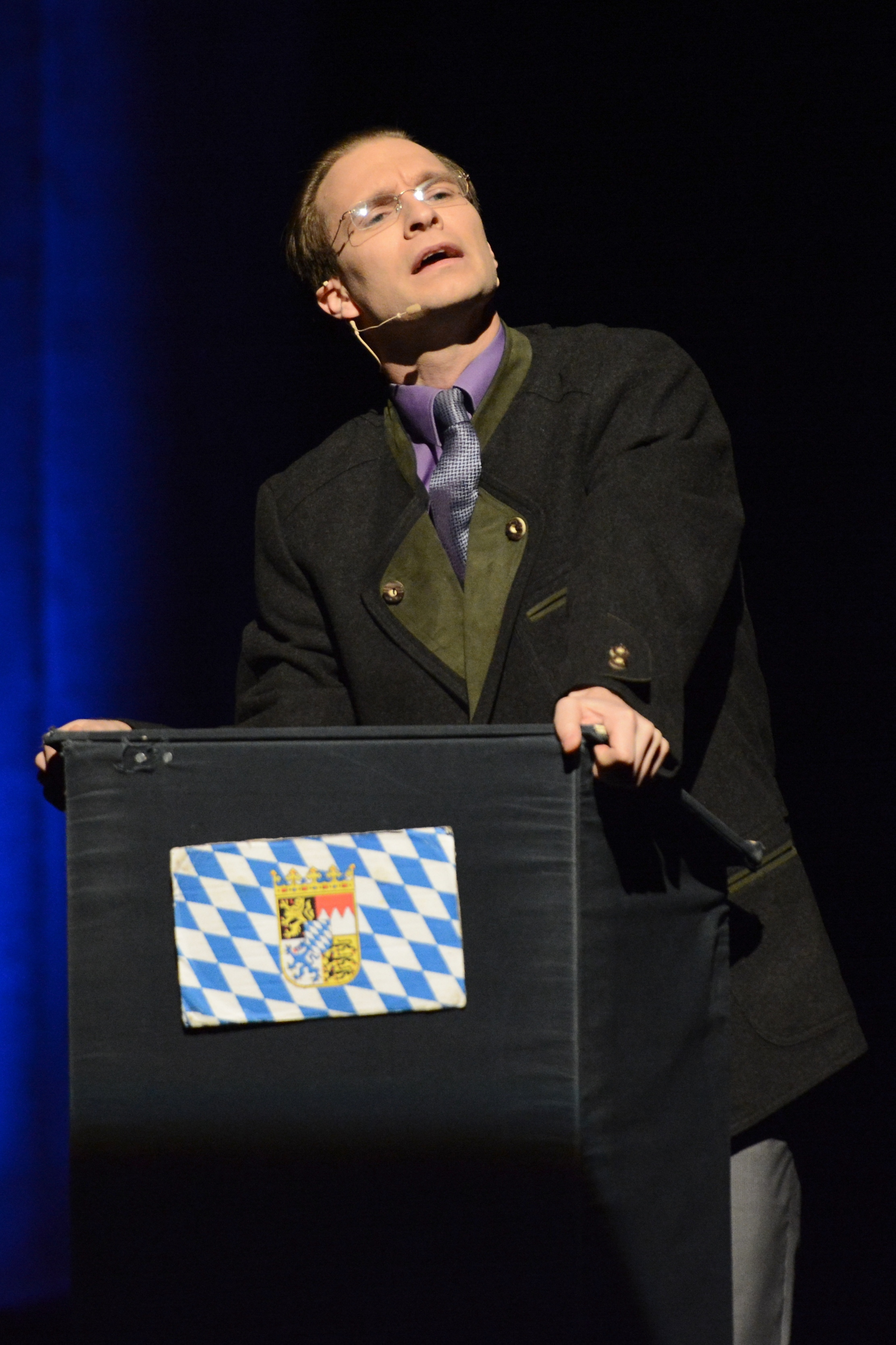 Erik Lehmann bei einer Vorrundenvorstellung von Das Schwarze Schaf 2014 in Wesel.